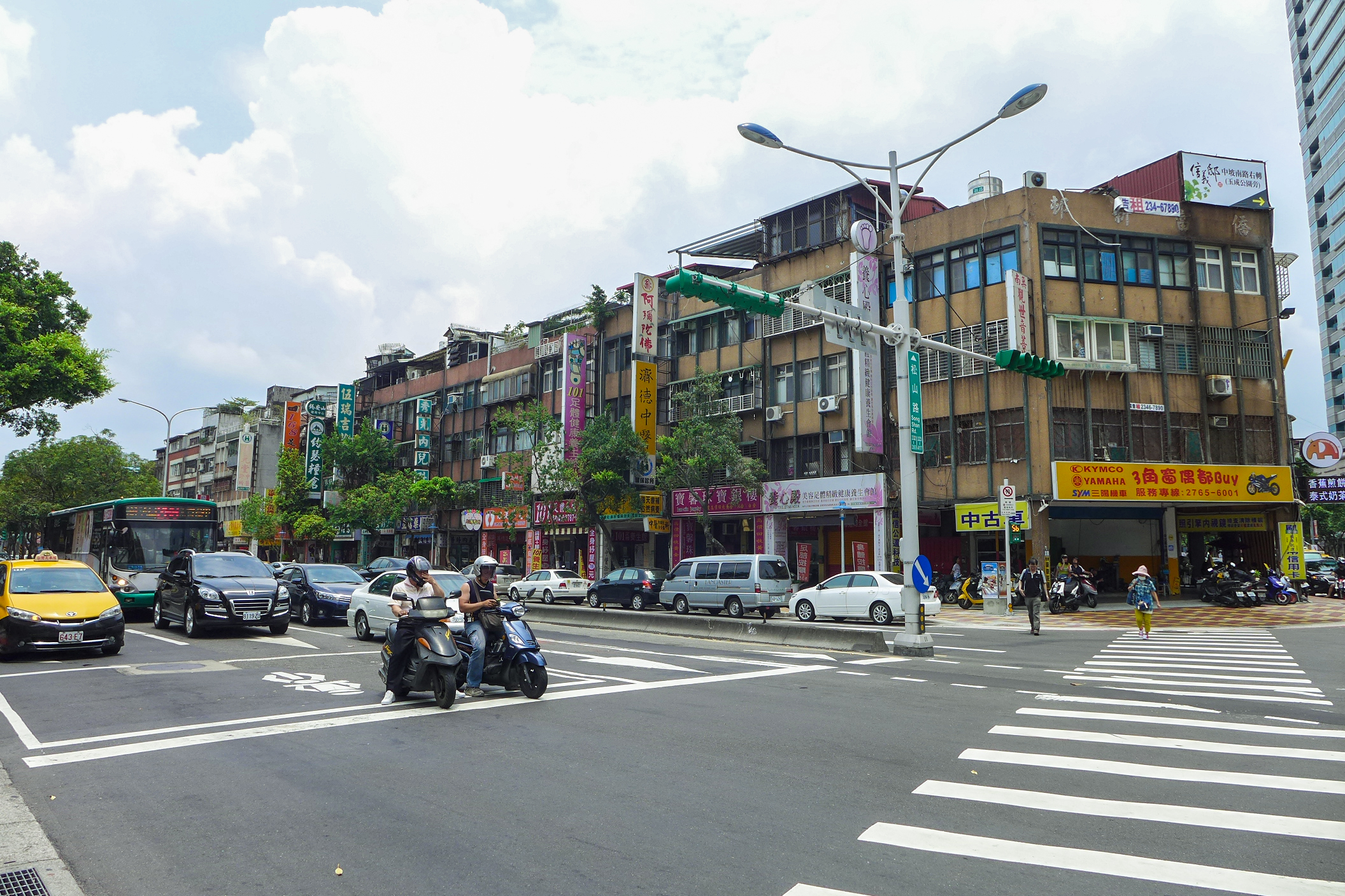 松山路